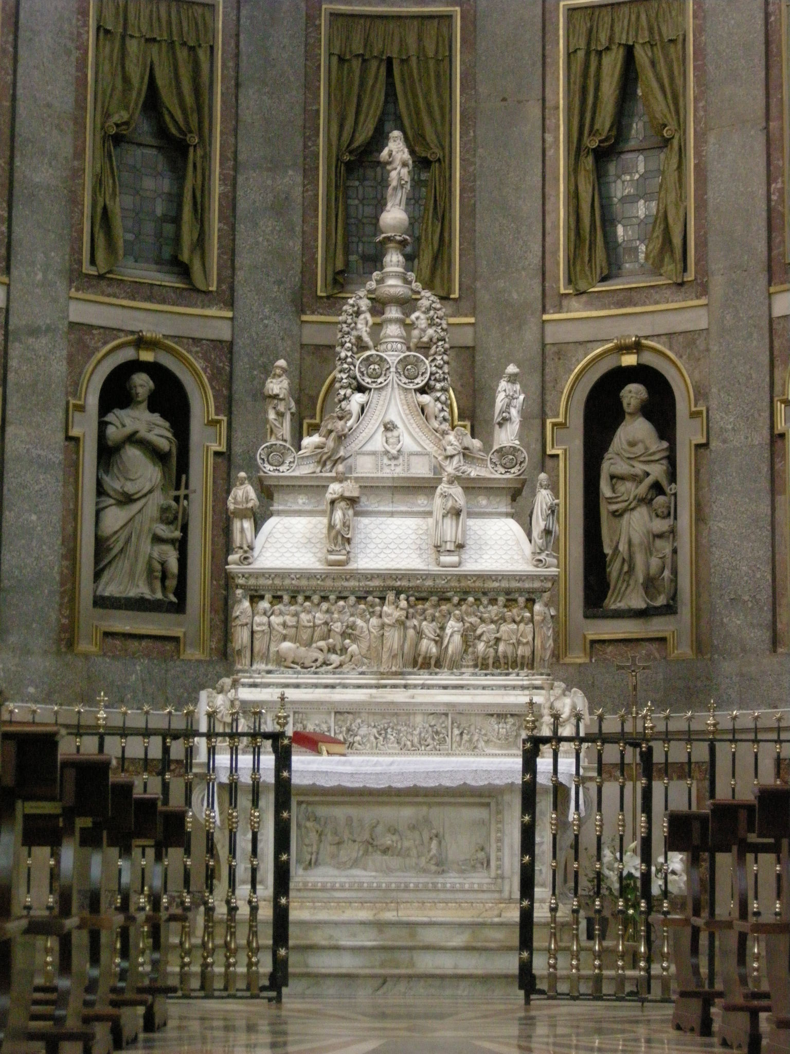 San domenico, bologna, interno, arca di san domenico